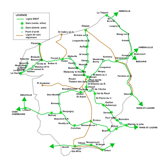 Carte du réseau Ter haute normandie